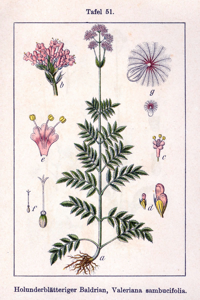 Valeriana sambucifolia J. C. Mikan ex Pohl Original Description Holunderblätteriger Baldrian, Valeriana sambucifolia